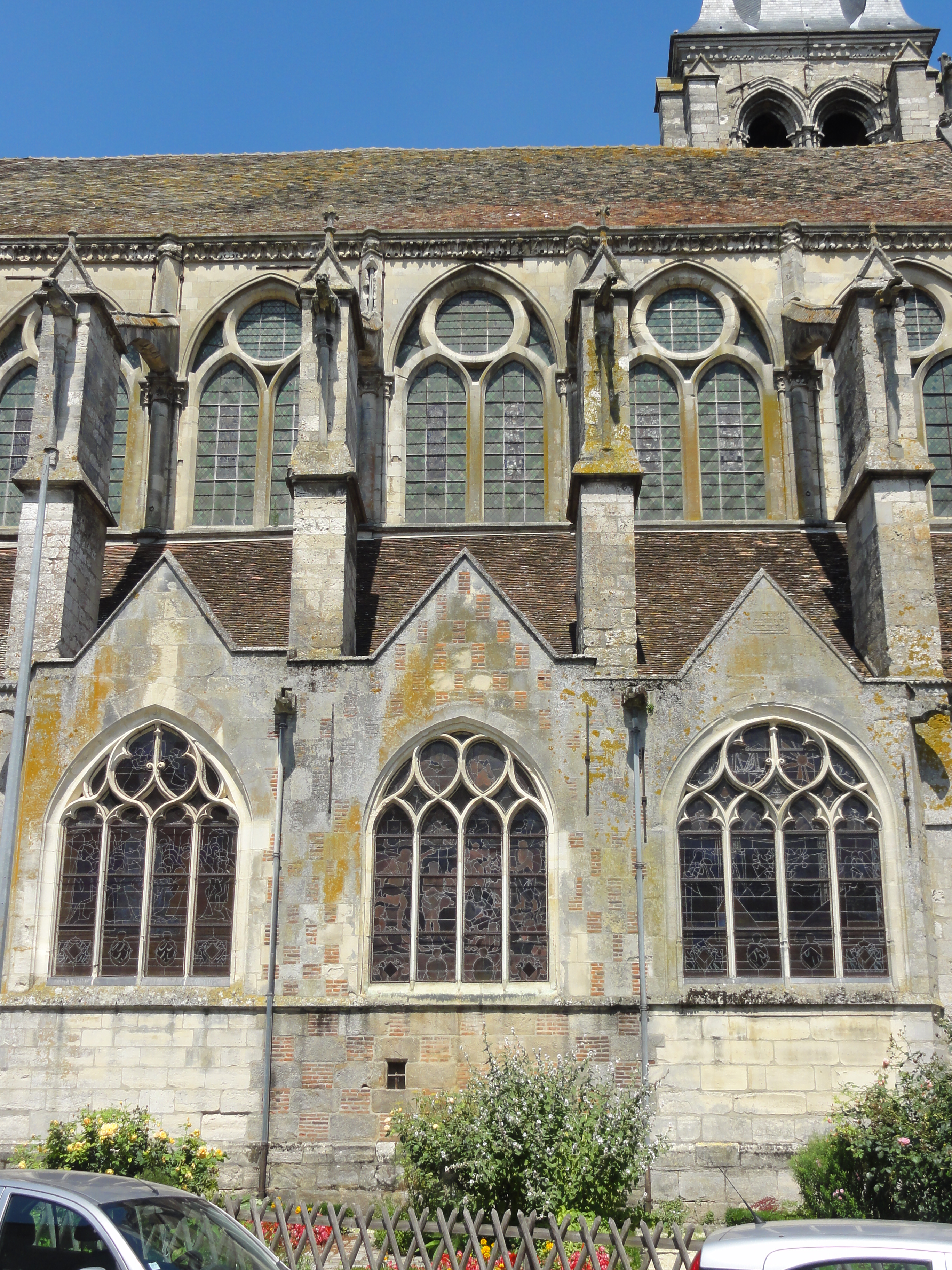 Élévation méridionale, 5e - 7e travée.